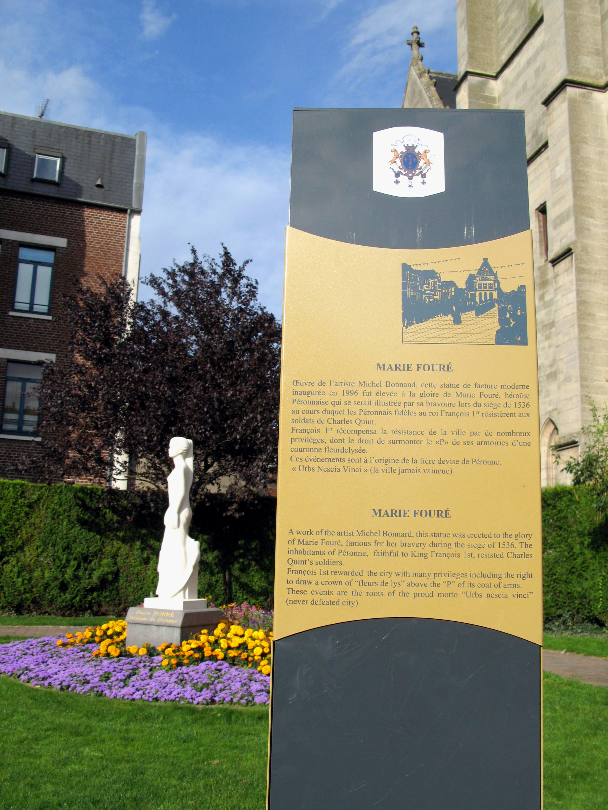 Péronne (Somme, France) - Statue de Marie Fouré, près de l'église.